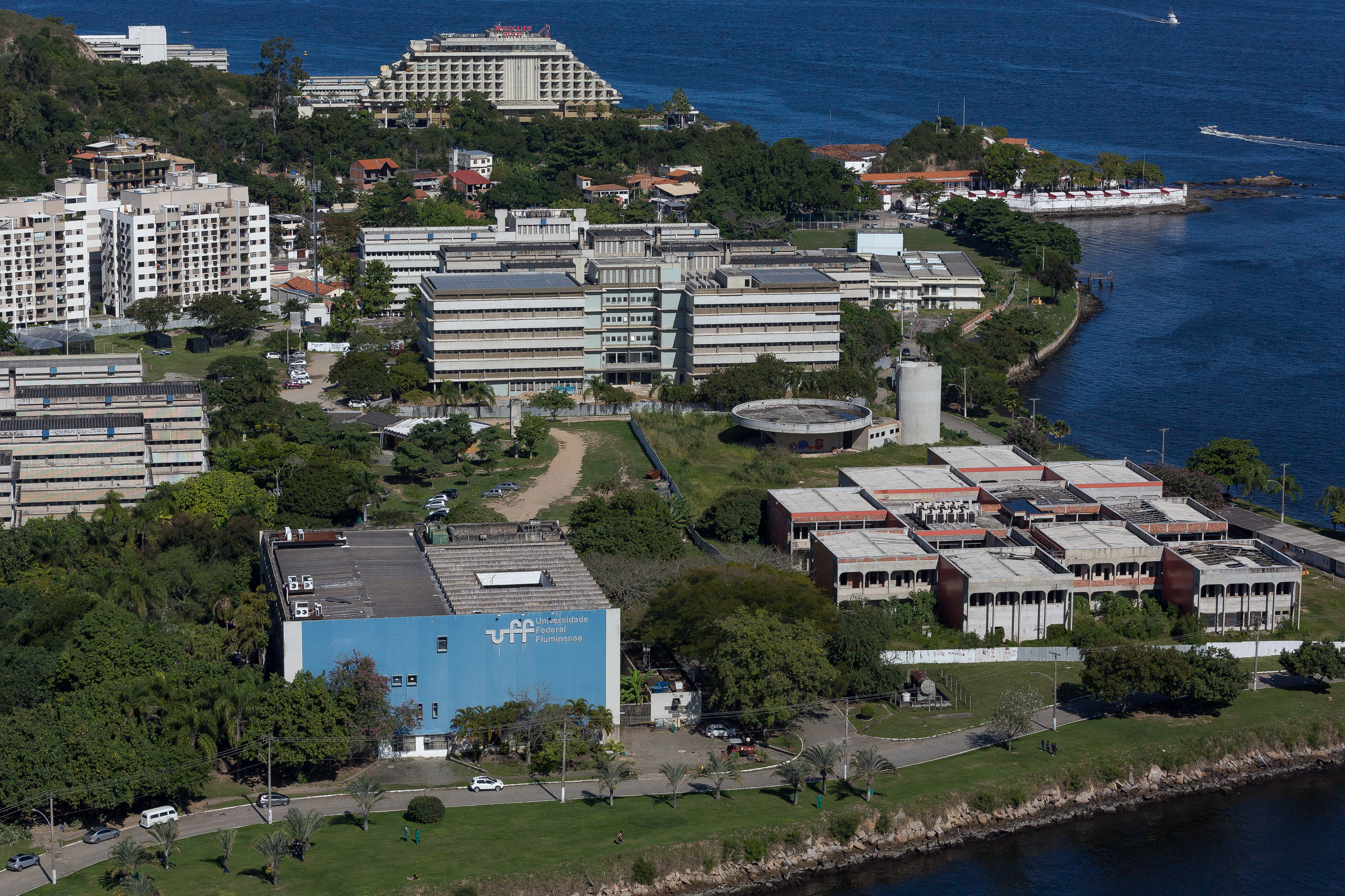 Vista aérea da Universidade Federal Fluminense, localizada em Niterói - RJ - Brasil.